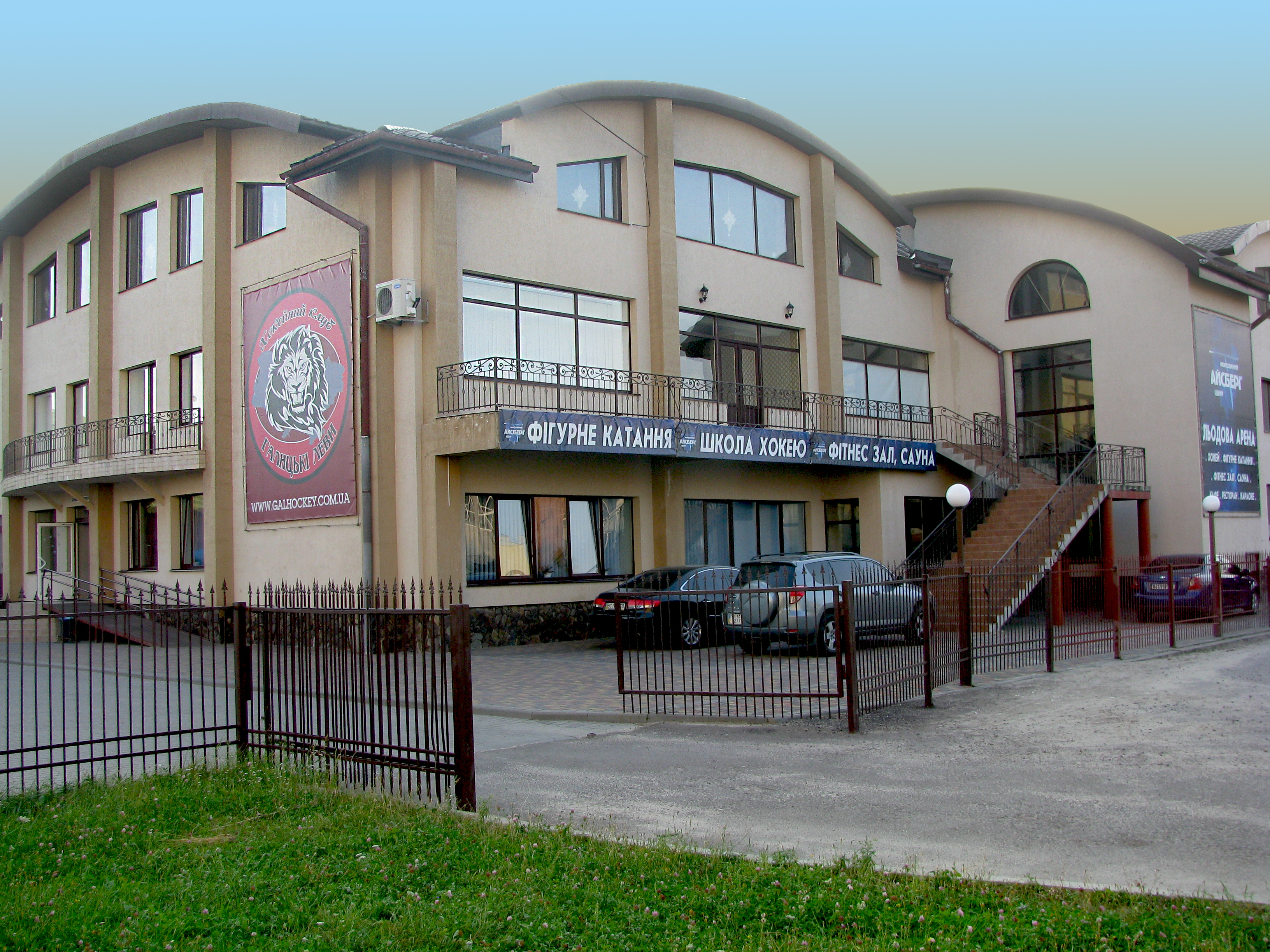 Льодова арена, м. Новояворівськ